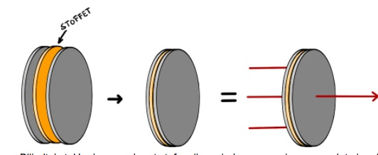 Her lægges der et stof mellem pladerne, man kan nu se det absorbere en hvis mængde IR-stråling.